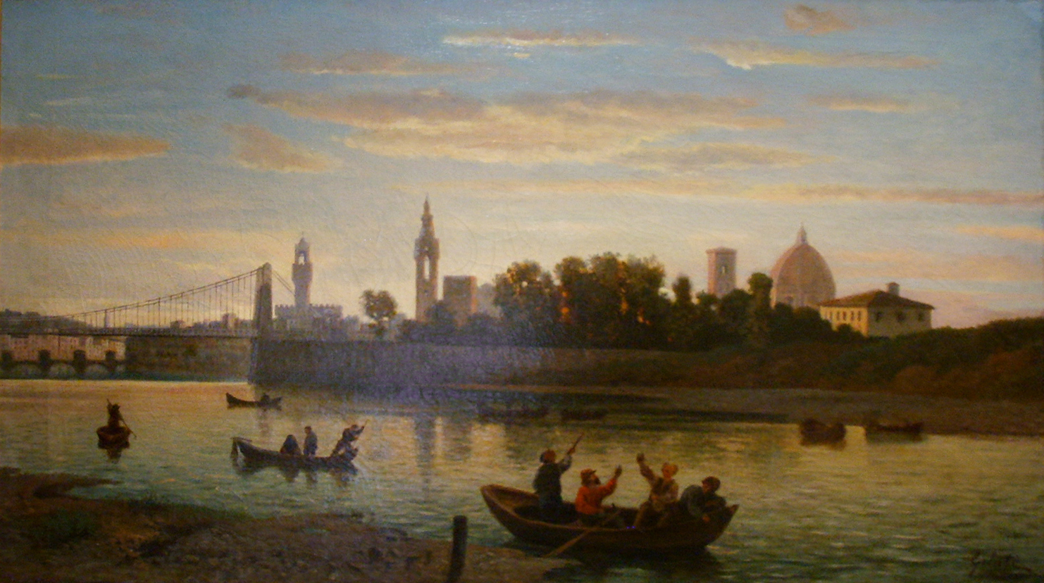 Pittore ottocentesco, veduta dell'arno col vecchio Ponte di San Niccolò